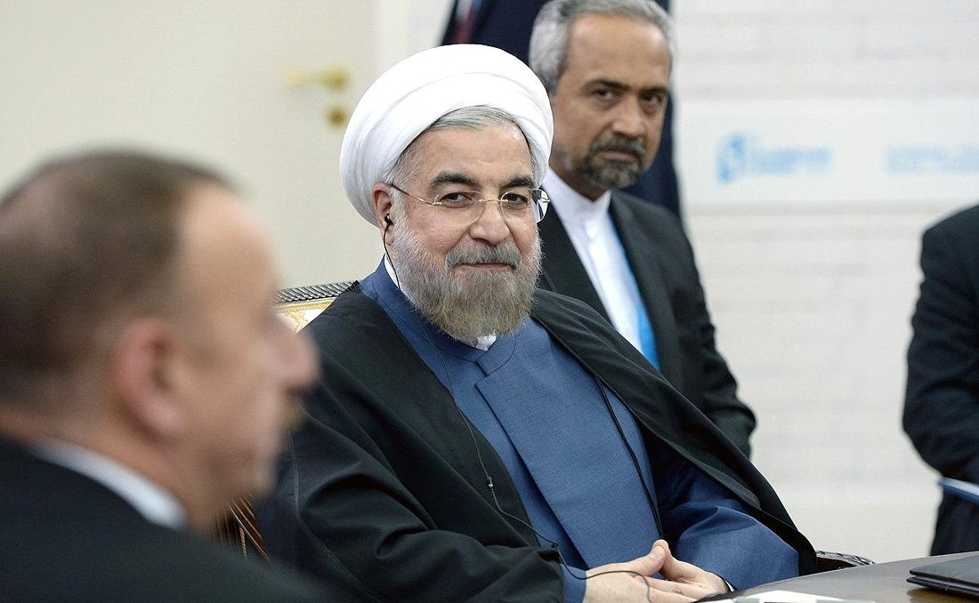 IV Каспийский саммит. Во время встречи глав государств – участников IV Каспийского саммита в узком составе. Президент Ирана Хасан Рухани.